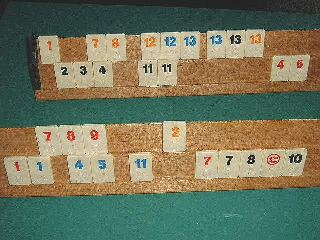 Source:selbst fotografiert am 22.9.04, gnu-fdl, Bild:Spiel und Ständer in meinem Besitz, Bild: Rummikubsteine und Okeyständer Lizenz